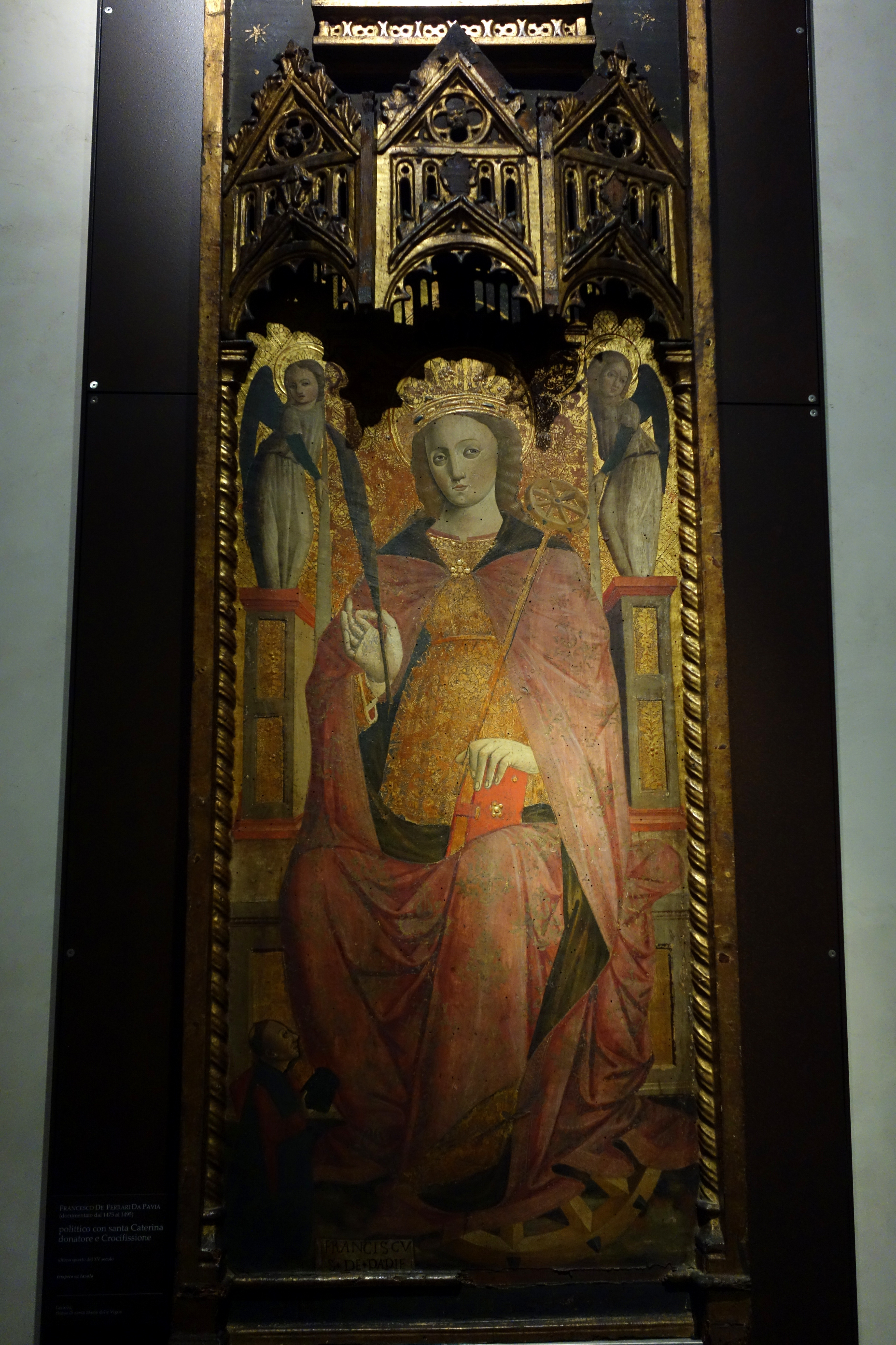 detail